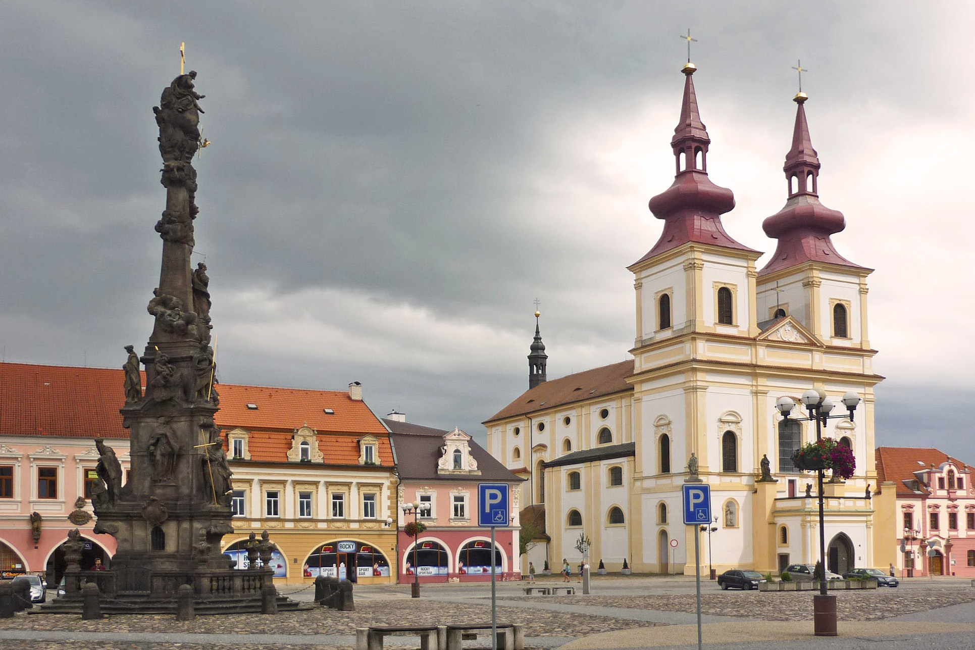 Marktplatz in Kaaden / Kadaň